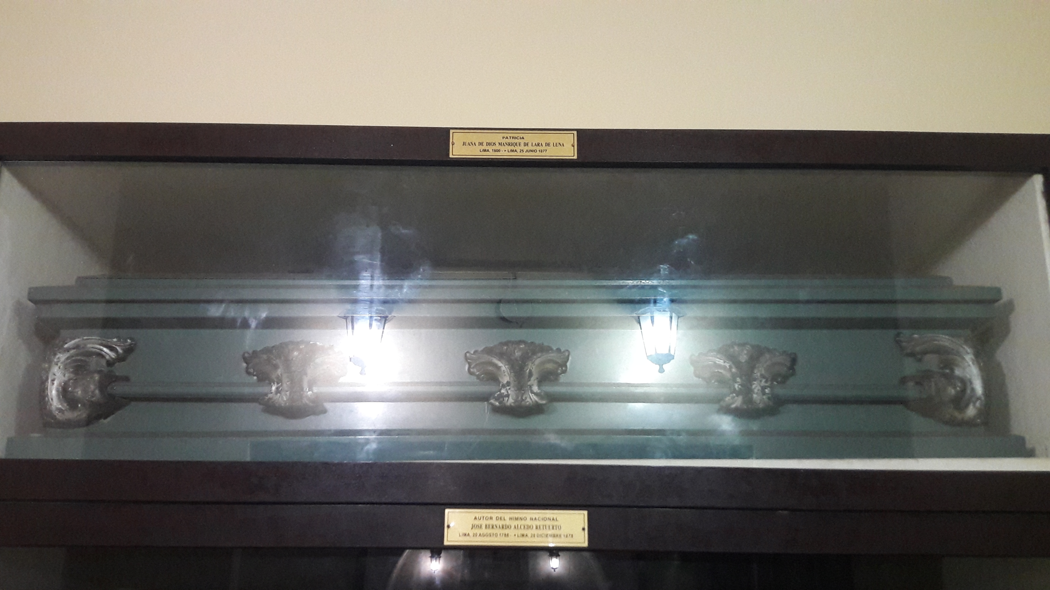 Tumba de Juana de Dios Manrique de Luna